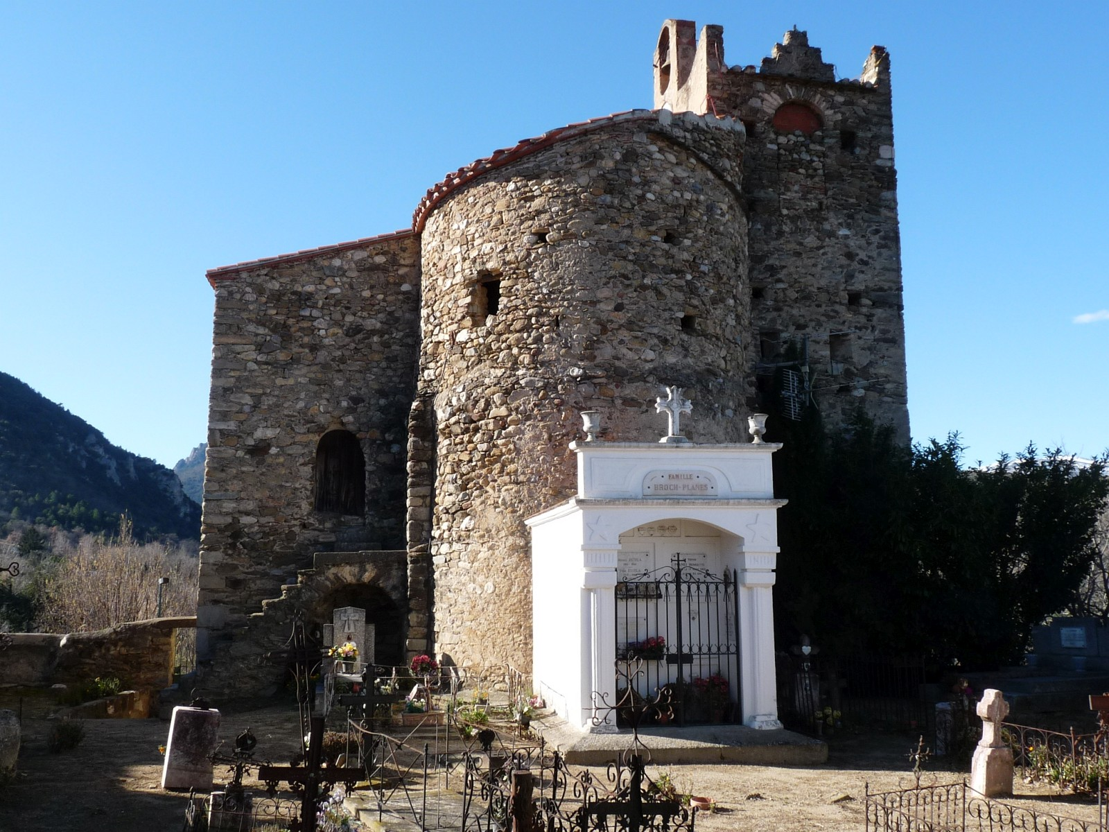 Eglise de Sirach, Ria-Sirach, Pyrénées-Orientales, France